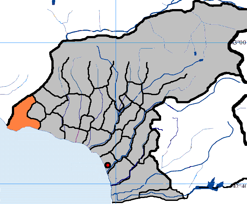 село Адзюбжа в Гудаутском районе